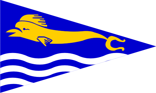 Bandera del Club Nautico de Javea